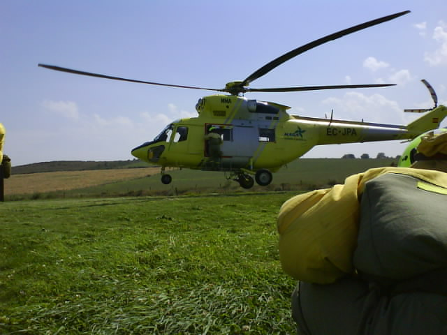 Foto del helicoptero Sokol